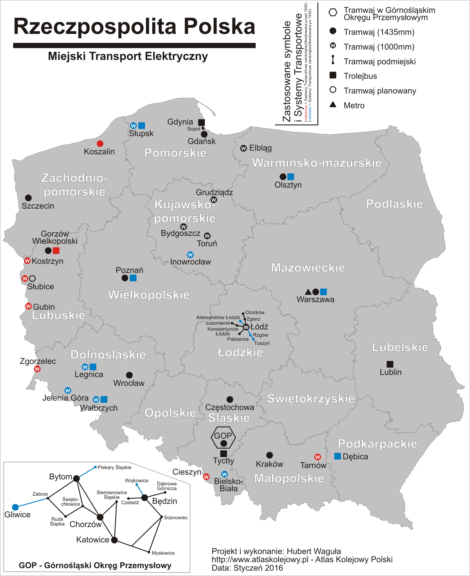 Transport publiczny w Polsce styczeń 2016